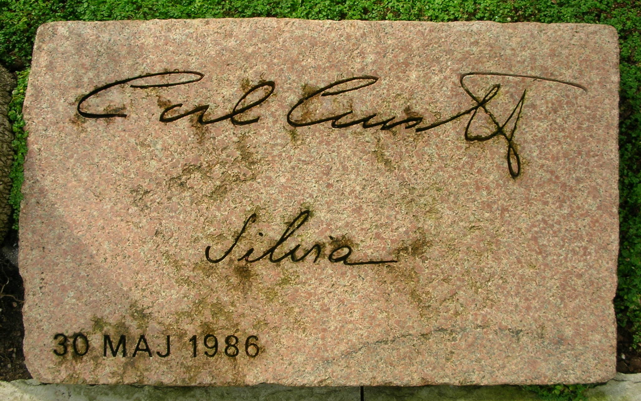 Kung Carl XVI Gustafs och drottning Silvias signaturer i Palmhuset, Göteborg.